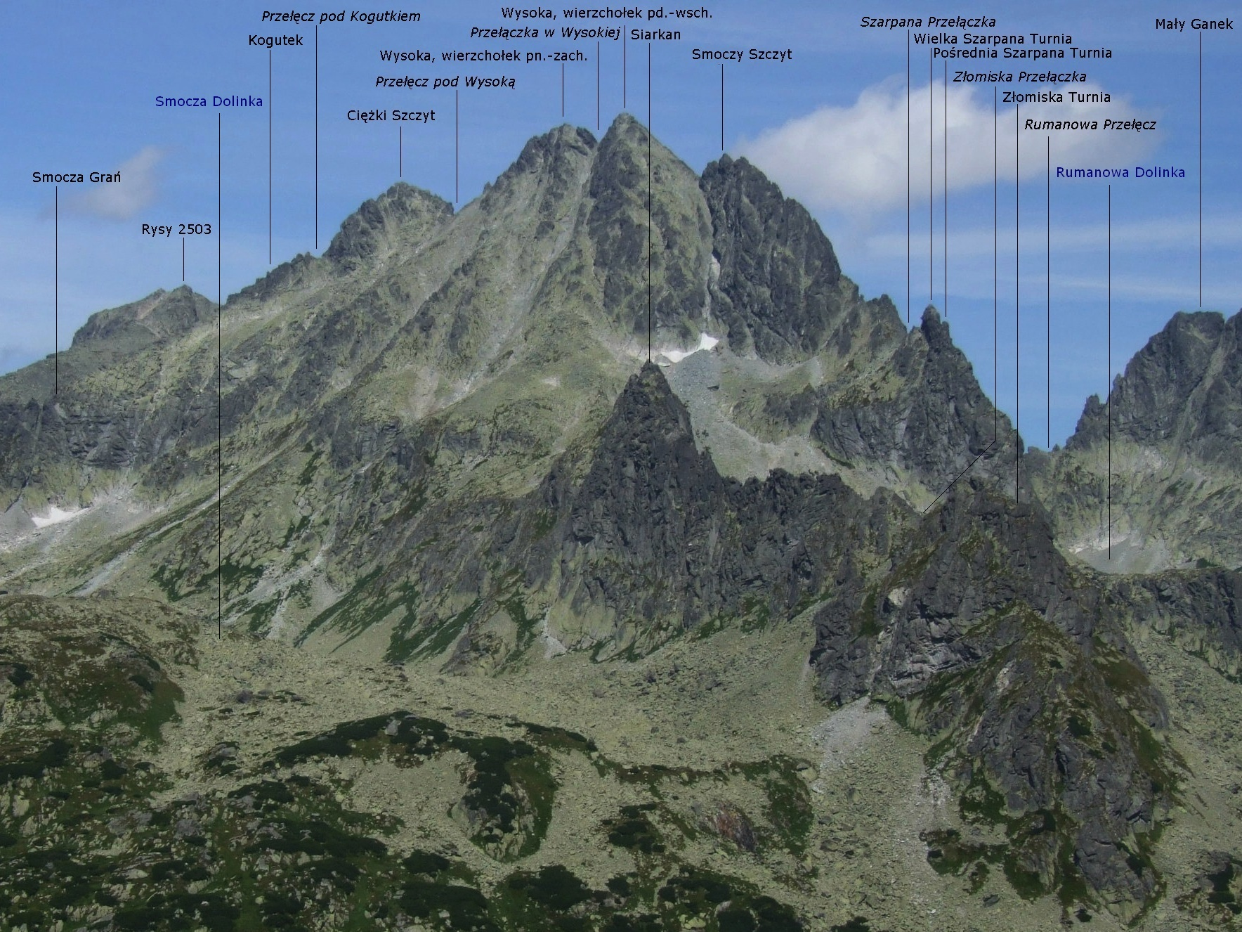 Widok ze zboczy Osterwy